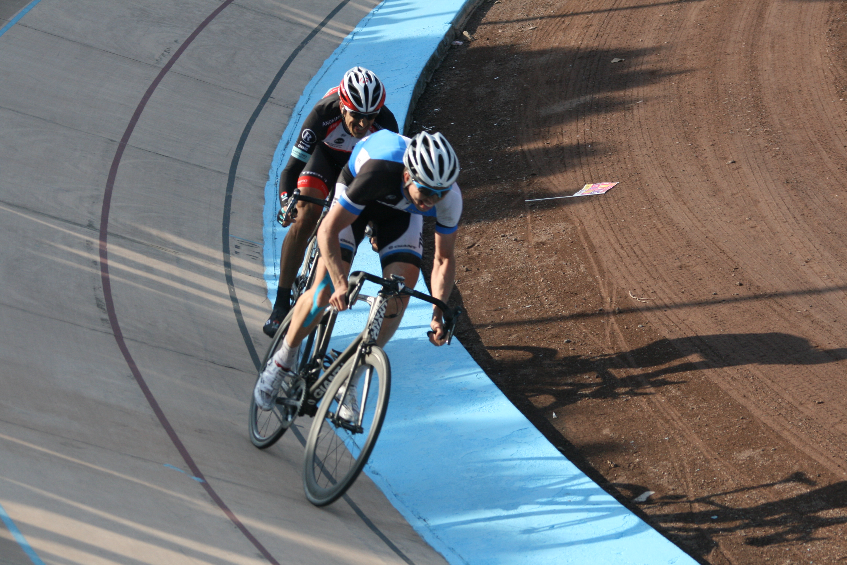 Paris-Roubaix 2013, vélodrome de Roubaix Sep Vanmarcke (front), Fabian Cancellara